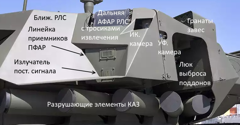 Башня Т-14